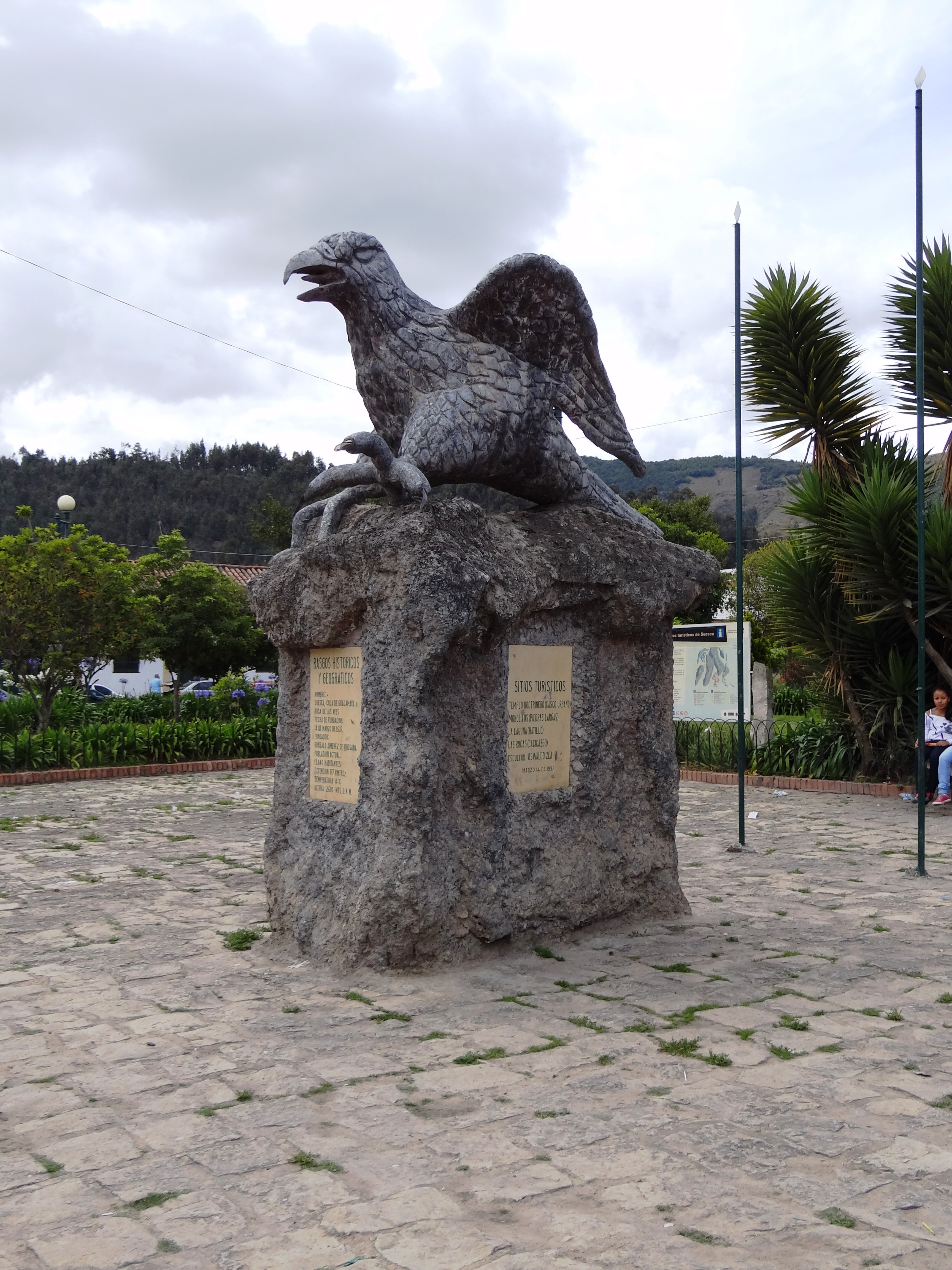 Monumento en el parque principal del municipio de Suesca, departamento de Cundinamarca, Colombia